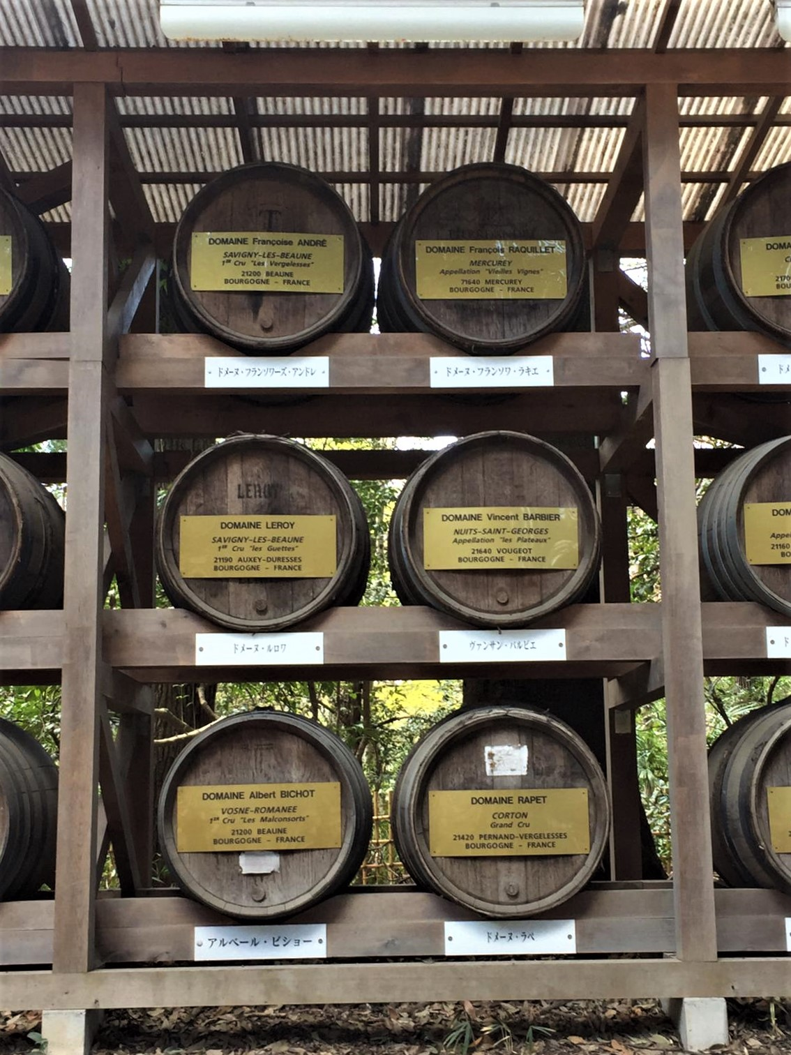 Fässer mit Burgunderwein ausgesttlt in Yoyogi-Park in Tokio: Domaine François André Savigny les Beaunes 1er Cru les Verglesses, 21200 Beaune Domaine François Raquillet Mercurey Appellation Vieilles Vignes, 71640 Mercurey Domaine Leroy Savigny-Les-Beaune 1er Cru les Guettes, 21190 Auxey-Duresses Domaine Vincent Barbier Nuits-Saint-Georges Appellation Les Plateaux,21640 Vougeot Domaine Albert Bichot Vosne-Romanée 1er Cru Les Malconsorts, 21200 Beaune Domaine Rapet Corton Grand Cru, 21420 Pernand-Vergelesses